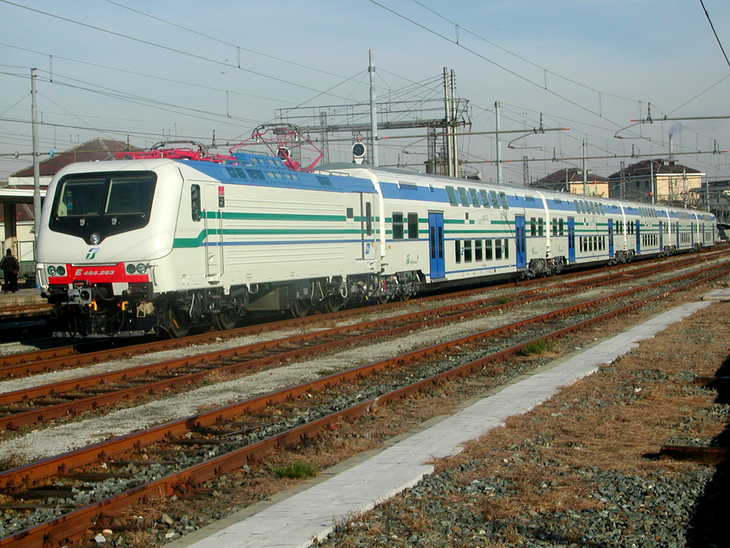 immagine rilasciata dall'autore